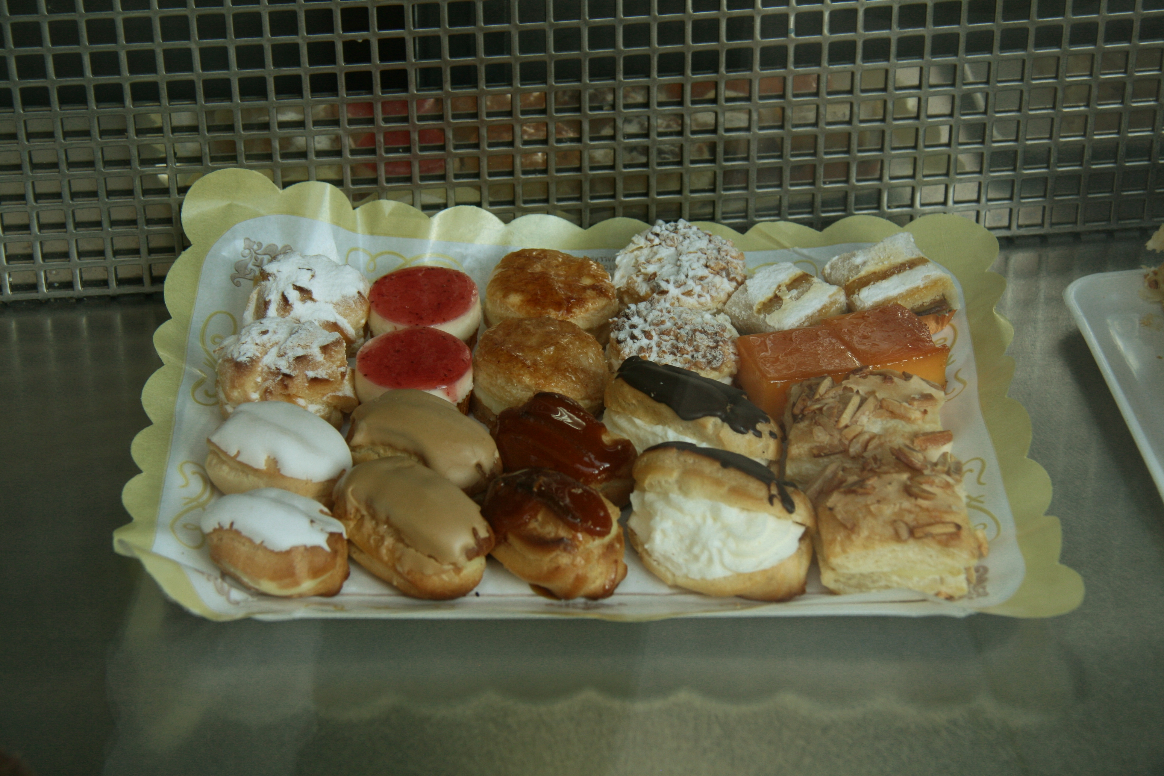 surtido de pasteles